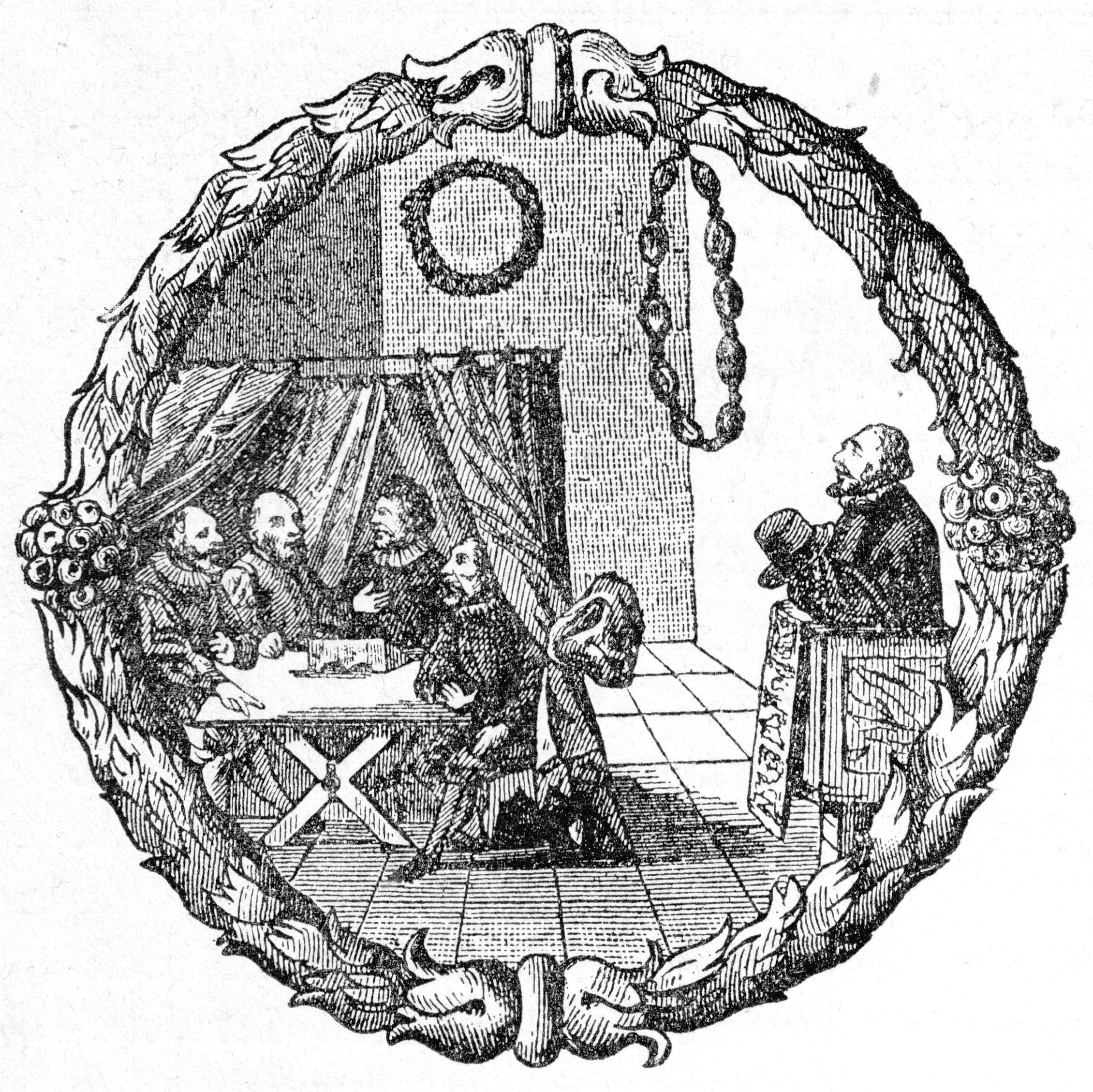 Bildunterschrift: „Meistersinger und Preisrichter“. Holzschnitt nach einer Farbenskizze im Hagerschen Liederbuch aus dem Jahre 1600.